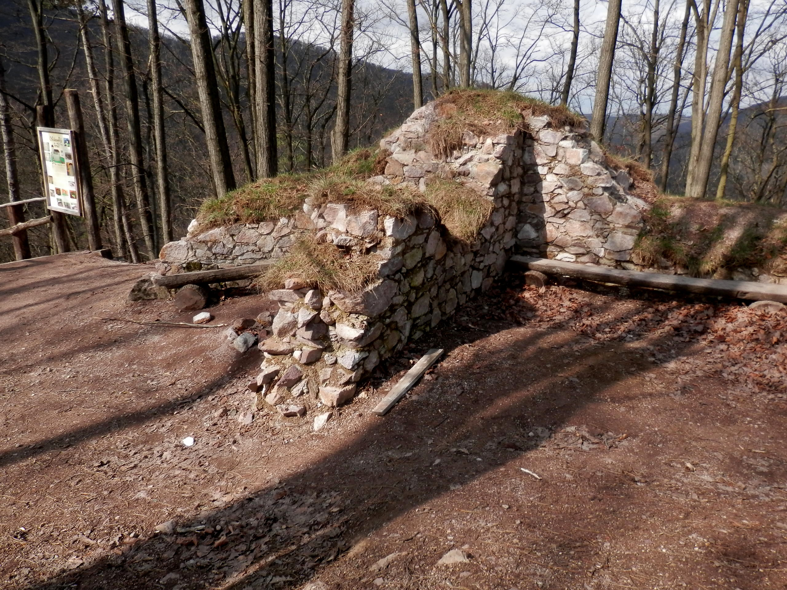 Rekonštrukcia zvyškov ruín Obišovského hradu. Obec Obišovce. 13.marca 2016.